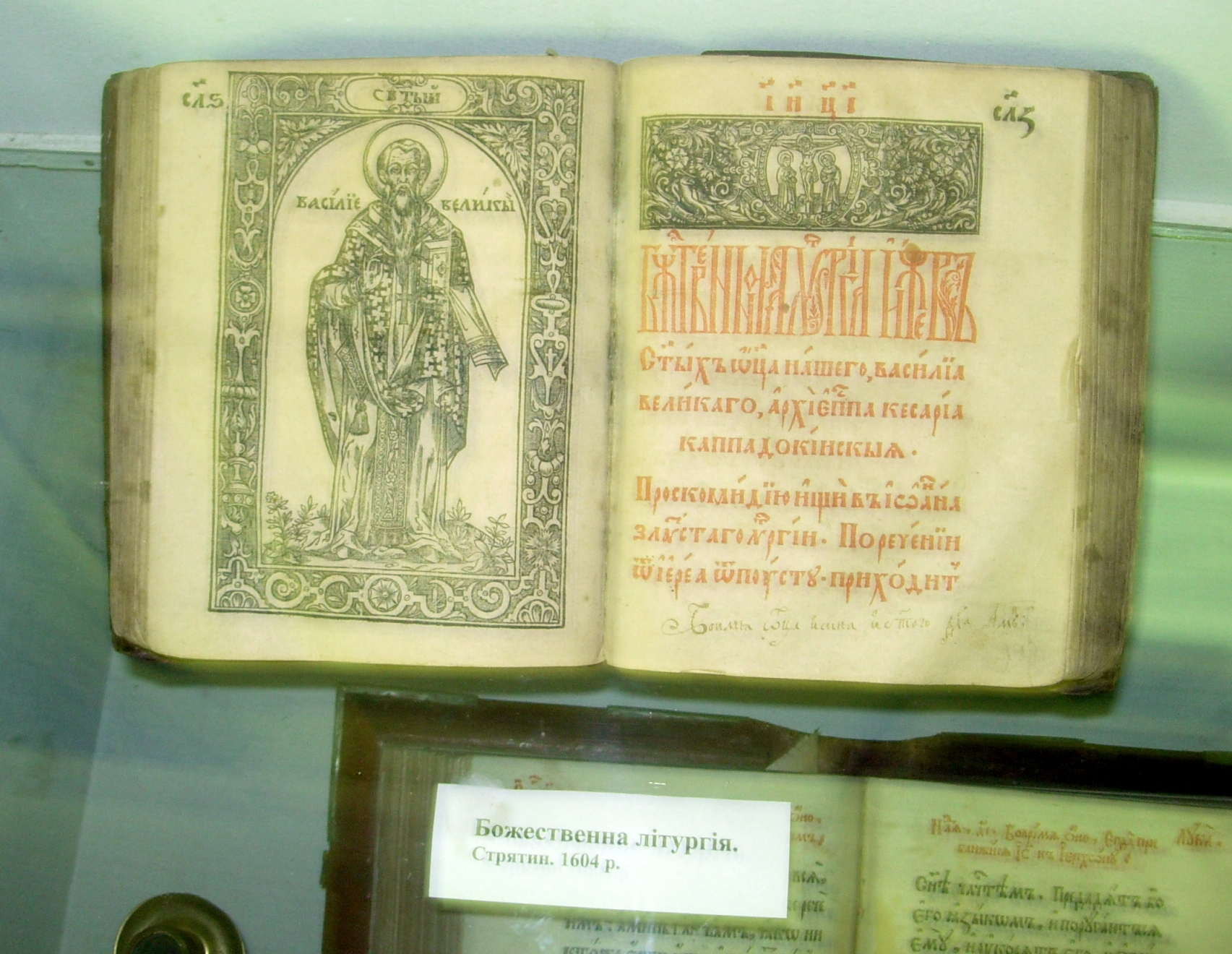 Страница изданной в Стратине «Божественной литургии», 1604 г. Львов.